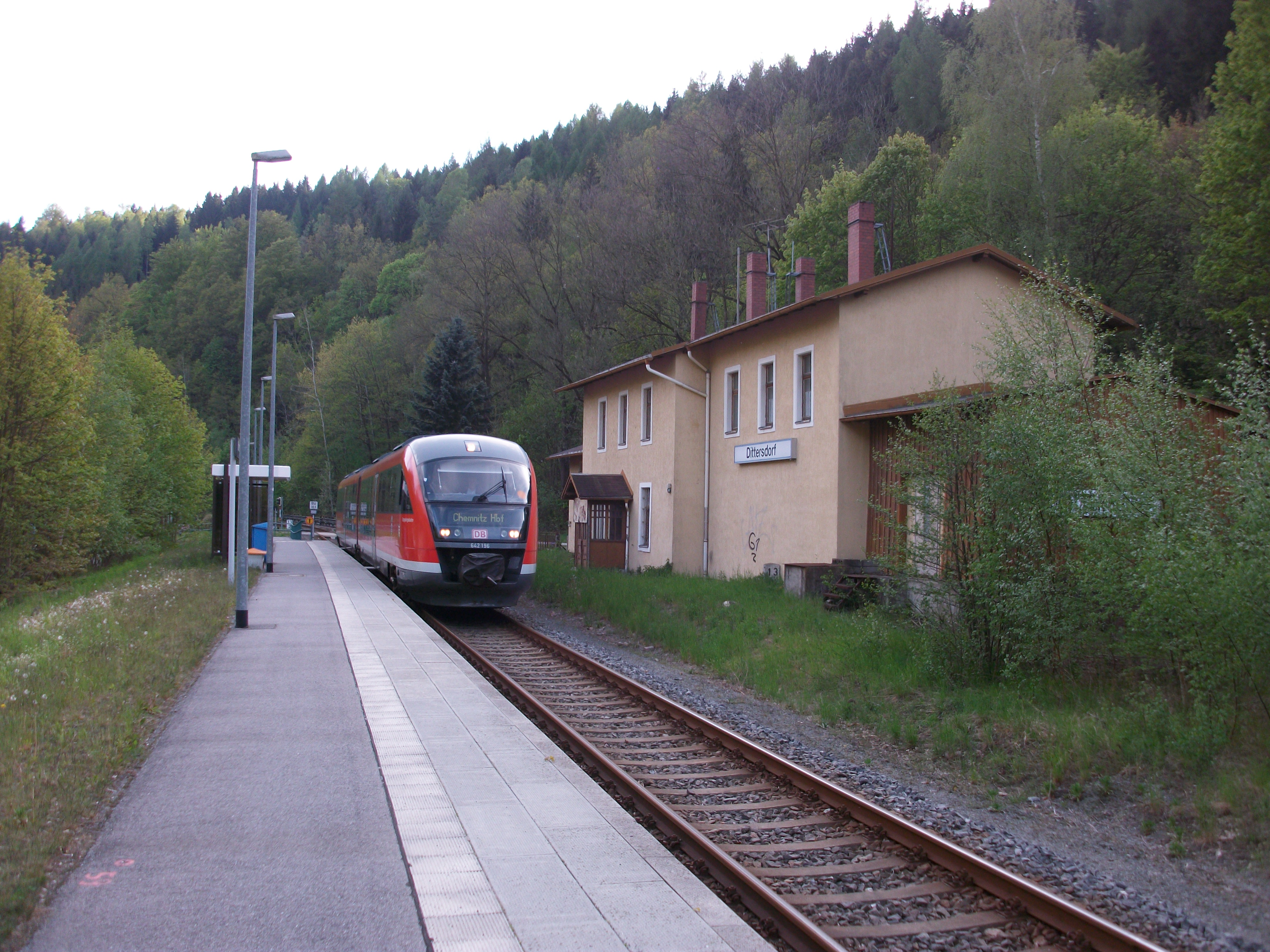 Haltepunkt Dittersdorf (b Chemnitz) mit Triebwagen 642 196 der Erzgebirgsbahn (2016)